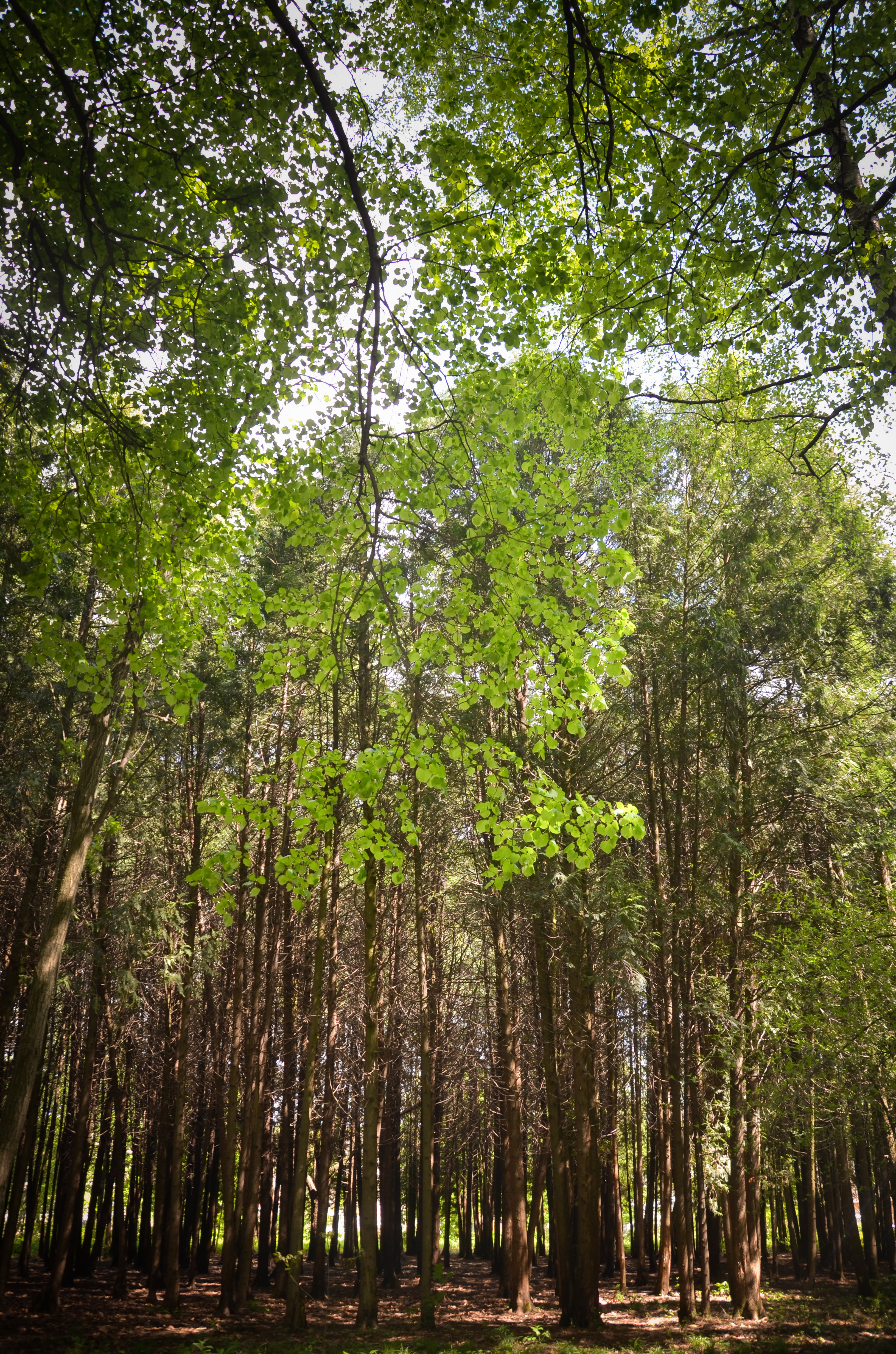 Площа дендропарку "Поділля" у місті Хмельницькому - 30, 5 га.